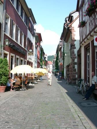 Heidelberg - a side street Description in de.wikipedia Foto einer typischen Heidelberger Seitenstraße. Aufgenommen am 15.06.2003. (C) Copyright 2003 Christian Bienia. Das Foto darf unter den Bedingungen der GNU Free Document License verwendet werden.